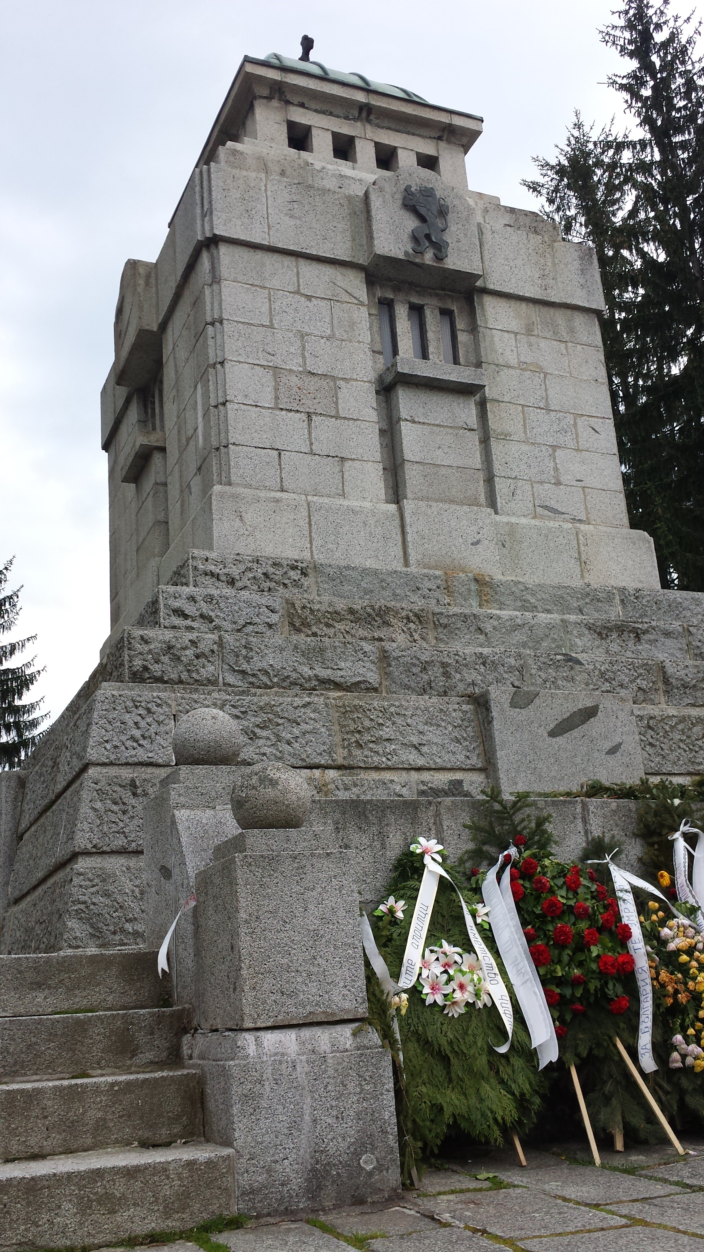 На загиналите в Априлското въстание